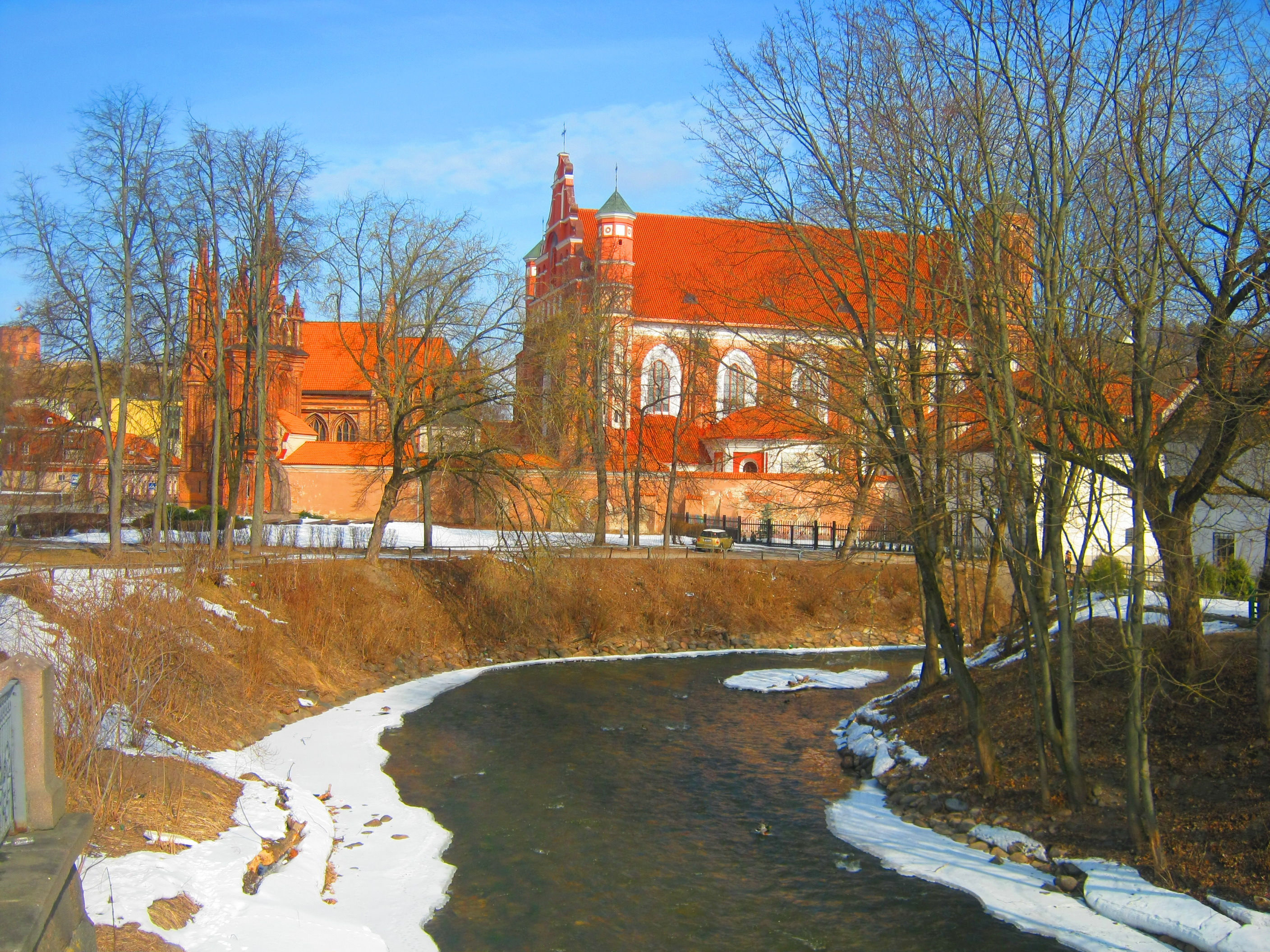 Šv. Onos bažnyčia ir Vilnia